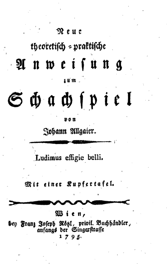 Titelblatt Allgaiers "Theoretisch-praktische Anweisung" (erster Teil). Quelle = google.books